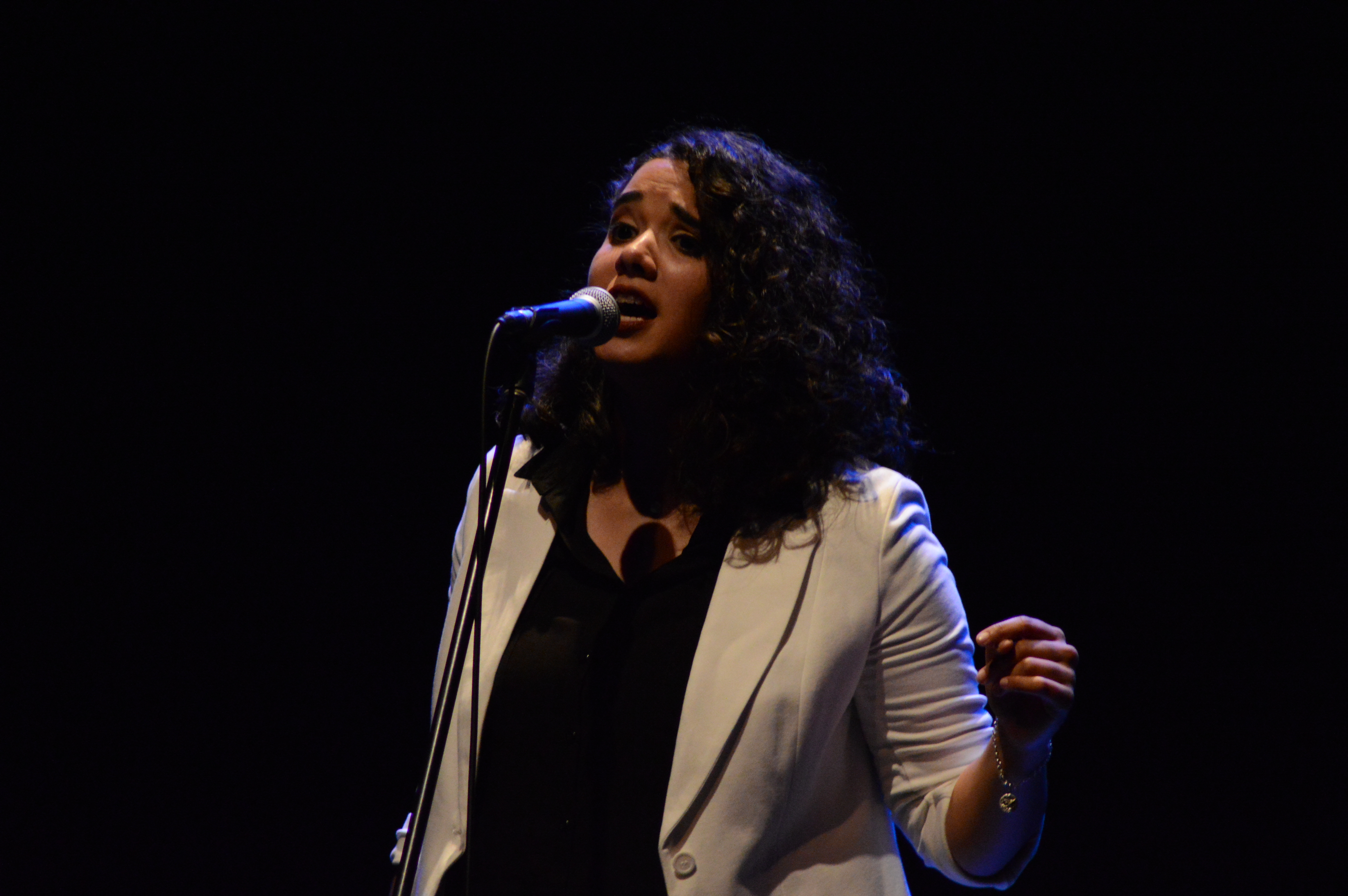 Sofía León en Sala Zitarrosa